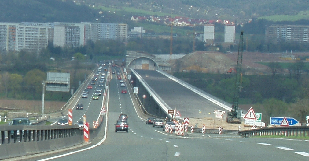 Bundesautobahn 4, Anschlussstelle 53, Jena-Goeschwitz, Baustelle der Saaletalbruecke mit Tunnelsegmenten